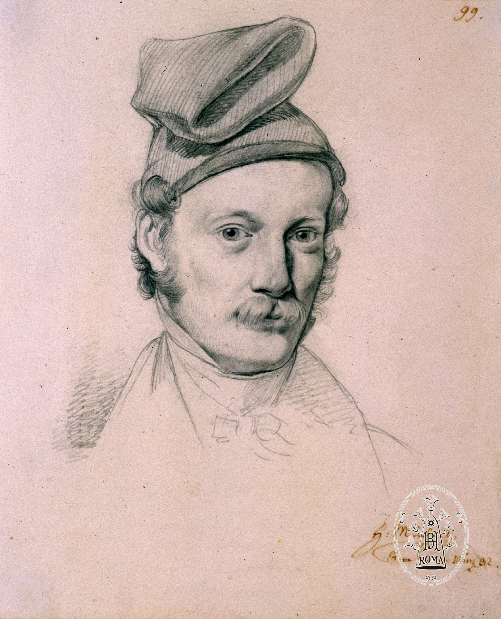 Selbstporträt Heinrich Meichelt, Rom im März 1832